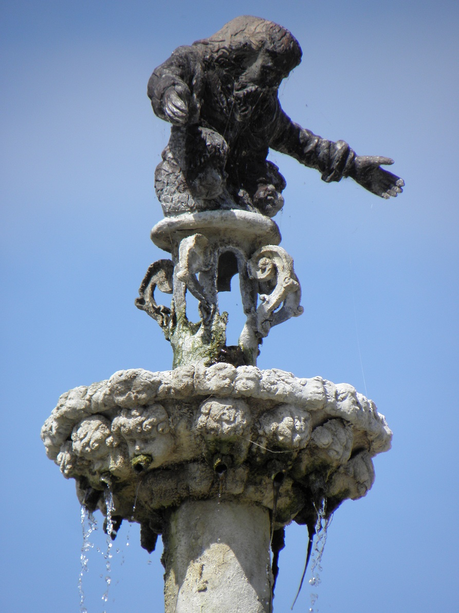 Détail de la fontaine de dévotion de l'enclos paroissial de Saint-Jean-du-Doigt (29). .